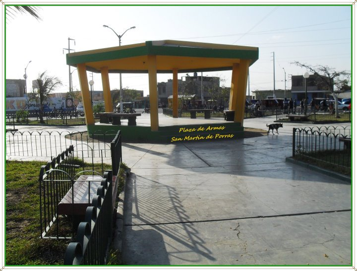 san martin de porres